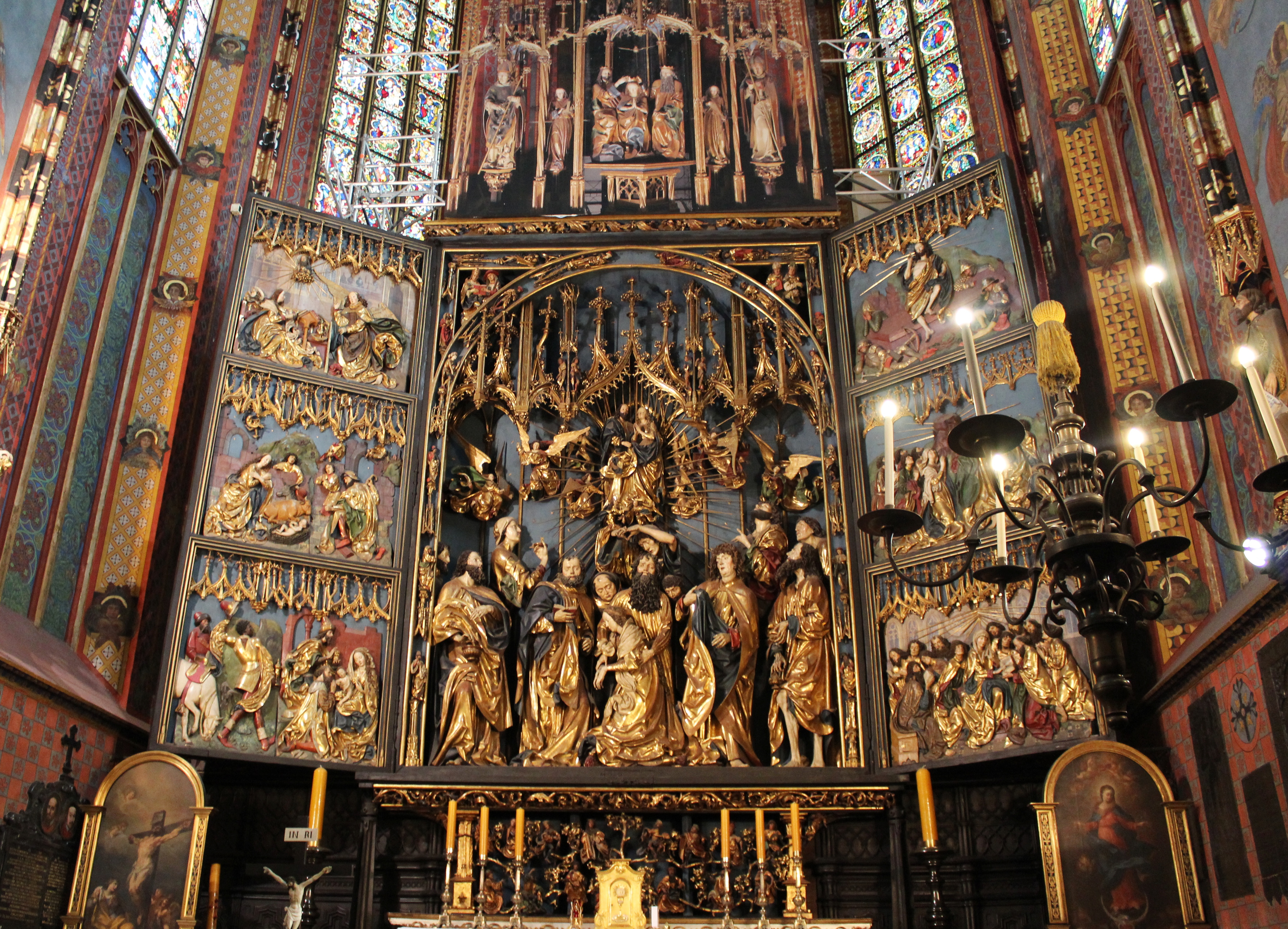 Kraków, kościół par. pw. Wniebowzięcia NMP (Mariacki), XIII/XIV, XIV, XIX